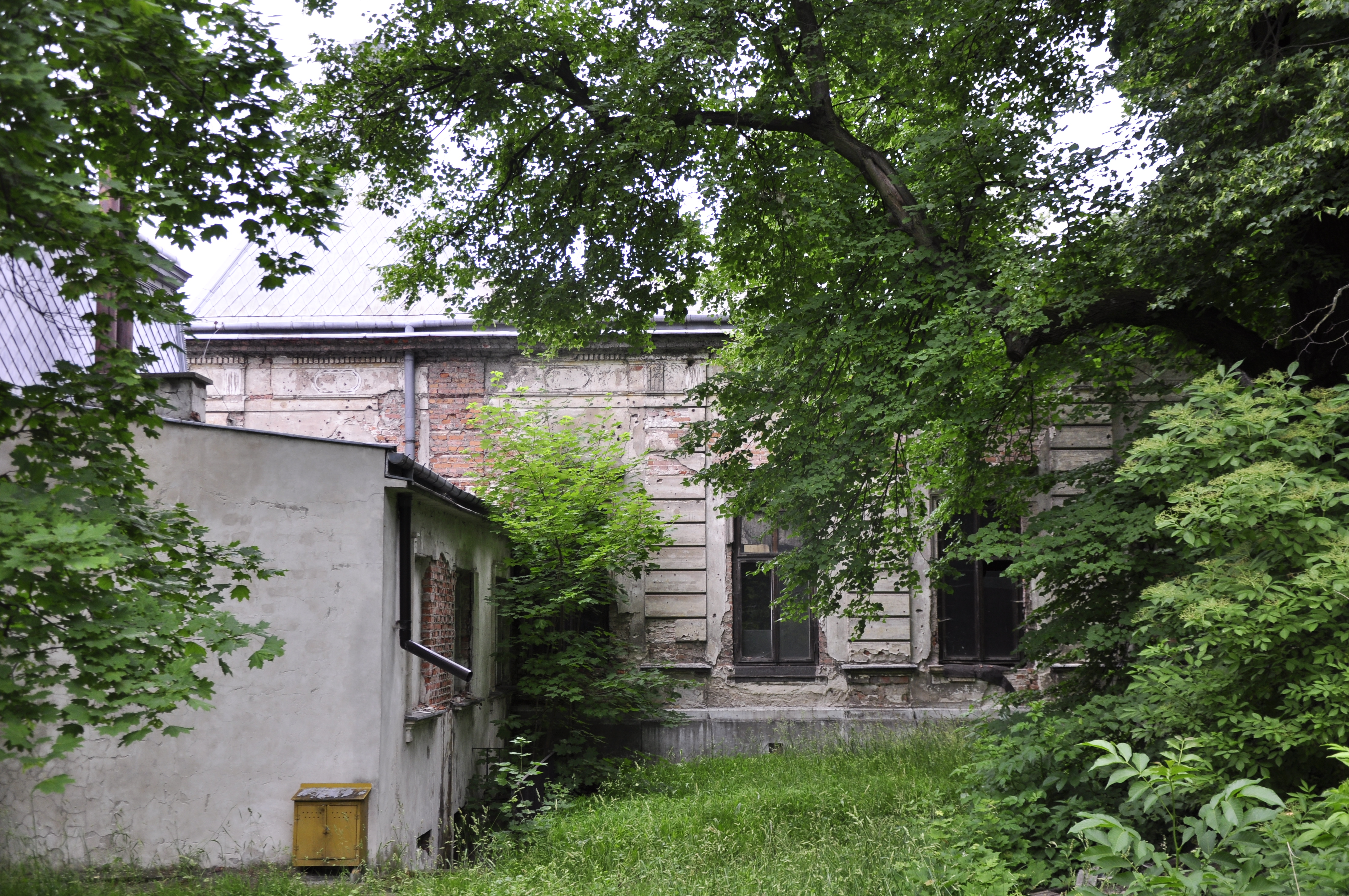 Warschau, Mlociny, Brühl-Palast, Südseite